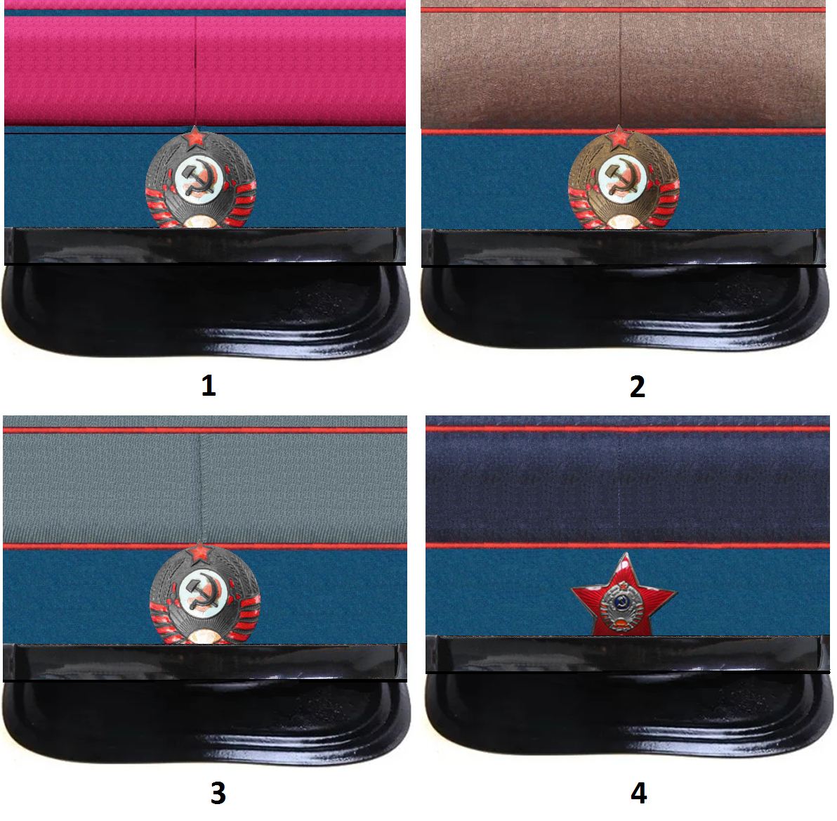 Фуражки милиции38